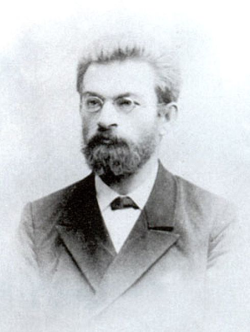 Павло Тутковський. Київ